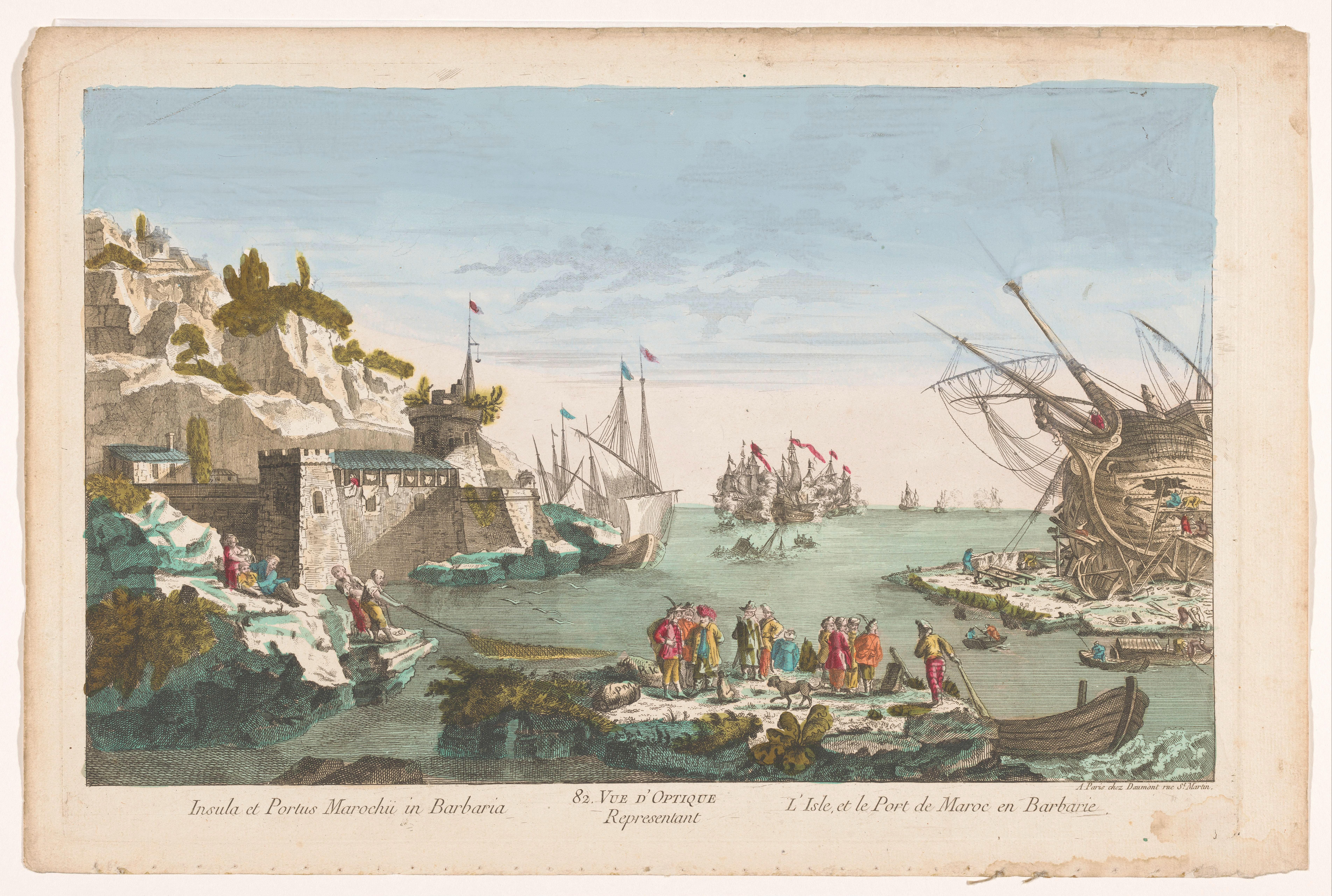 IdentificatieTitel(s): Gezicht op een haven met een scheepswerf te Marokko82. Vue d'optique representant l'isle, et le port de Maroc en Barbarie (titel op object)Objecttype: prent opticaprent Objectnummer: RP-P-1925-1352Opschriften / Merken: verzamelaarsmerk, verso rechtsonder, gestempeld: Lugt 2166watermerkOmschrijving: Rechts een schip op het land en links een versterkt bouwwerk aan de waterkant. Op de voorgrond staan groepen figuren. Op de achtergrond woedt een zeeslag tussen schepen. In de titel genummerd: 82.VervaardigingVervaardiger: uitgever: Jean-François Daumont (vermeld op object)prentmaker: anoniemPlaats vervaardiging: uitgever: Parijsprentmaker: FrankrijkDatering: 1745 - 1775Fysieke kenmerken: ingekleurde etsMateriaal: papier waterverf Techniek: etsen / penseelAfmetingen: plaatrand: h 302 mm × b 459 mmOnderwerpWat: sea (seascape) (+ landscape with figures, staffage)rocky coastshipyard, shipdockshipyard-workersrowing-boat, canoe, etc.sailing-ship, sailing-boatcivic architecture; edifices; dwellingsharbourbattleWaar: MarokkoVerwerving en rechtenCredit line: Schenking van C.J. van der FeenVerwerving: schenking 1925Copyright: Publiek domein